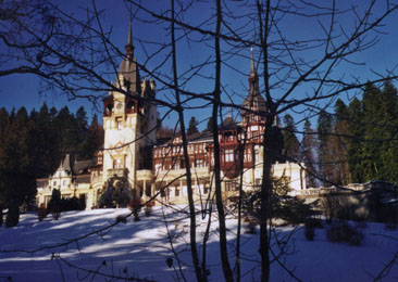 château de Peleş